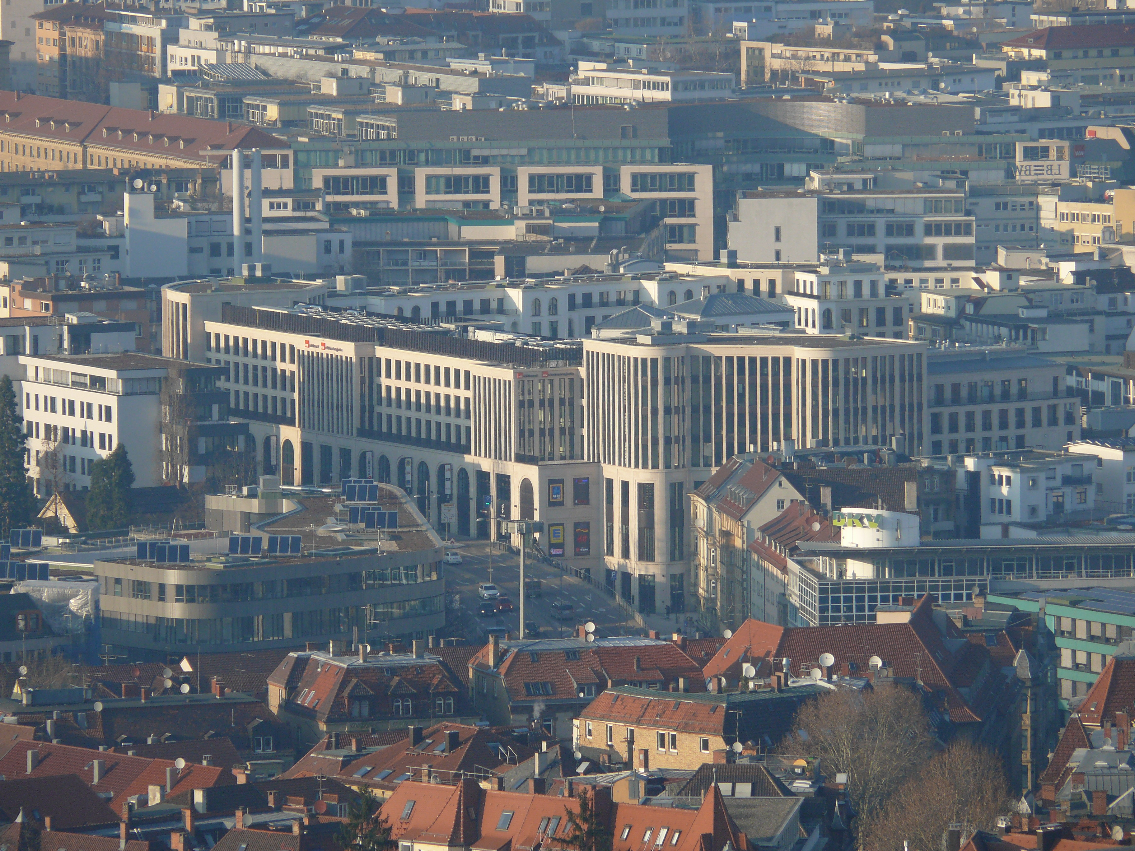 Blick auf die Westseite des Einkaufszentrums "Das Gerber" in Stuttgart.